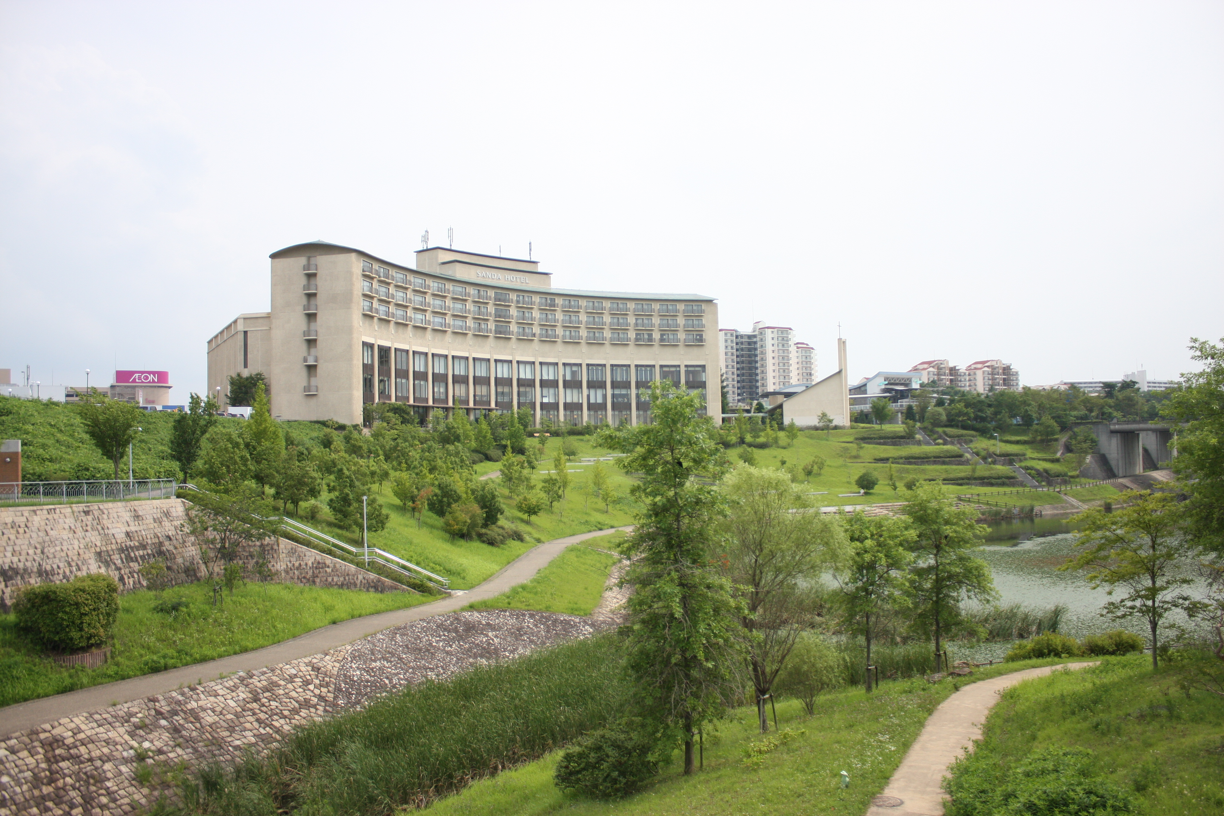 ウッディタウン 街風景